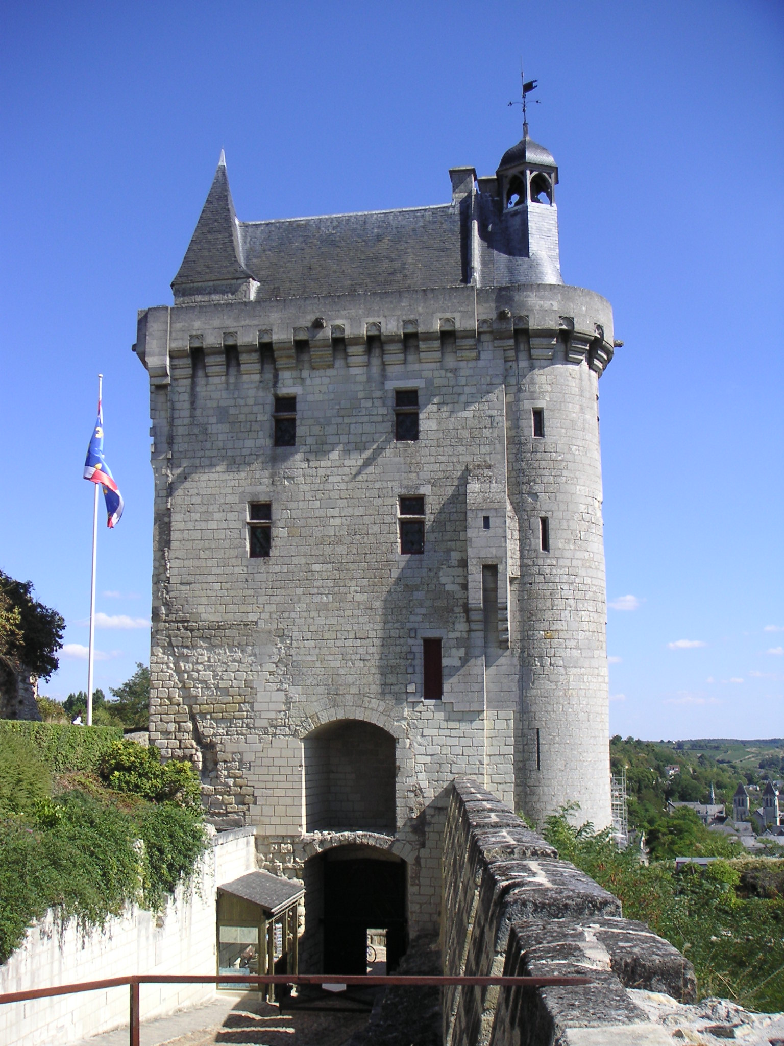 Tour de l'horloge château de Chinon